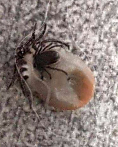 Fästing som biter en fästing. Plockad från en hund sommaren 2019 i Sverige